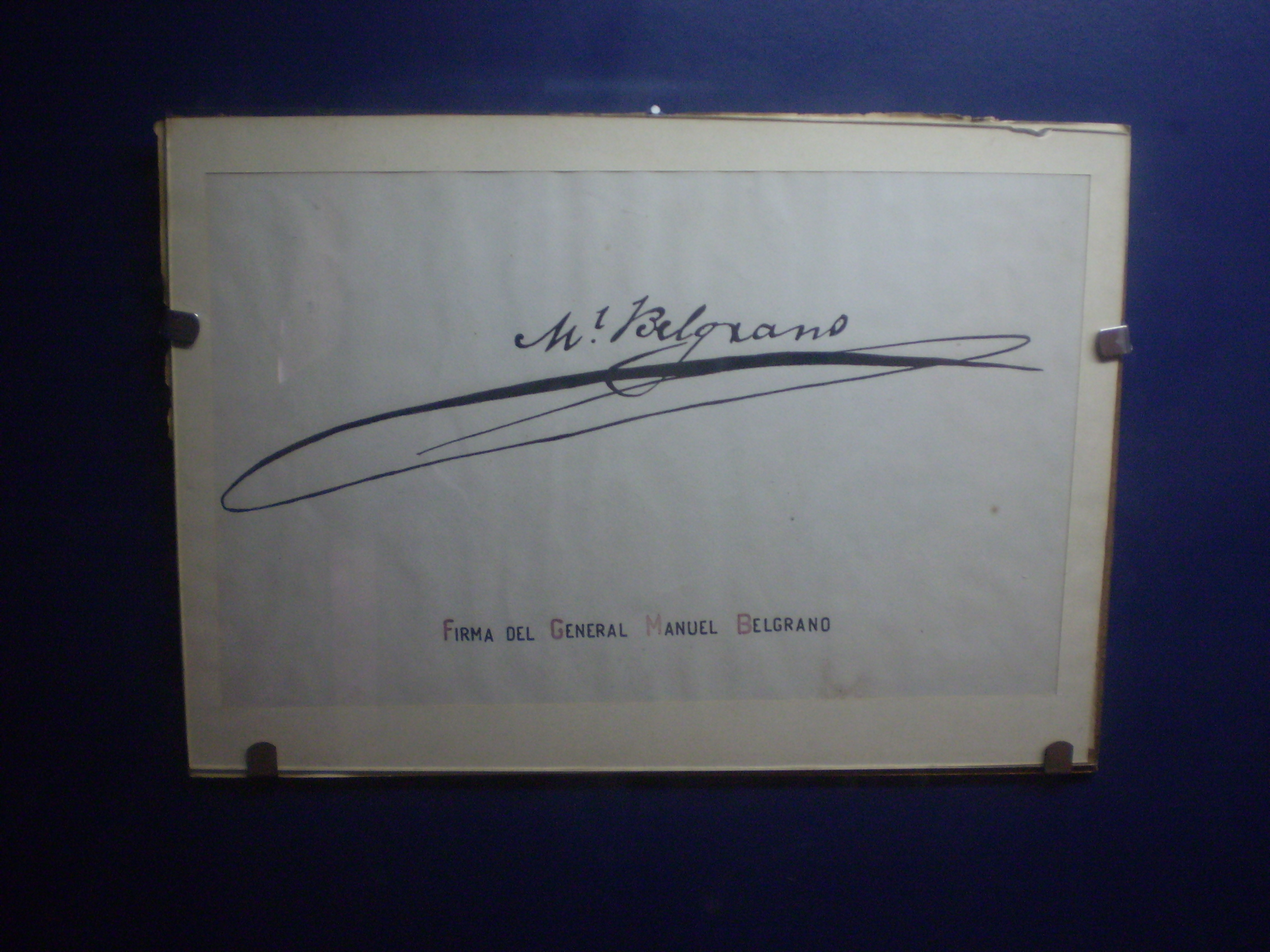 Firma de Manuel Belgrano. Museo Histórico del Norte. Cabildo de la ciudad de Salta.